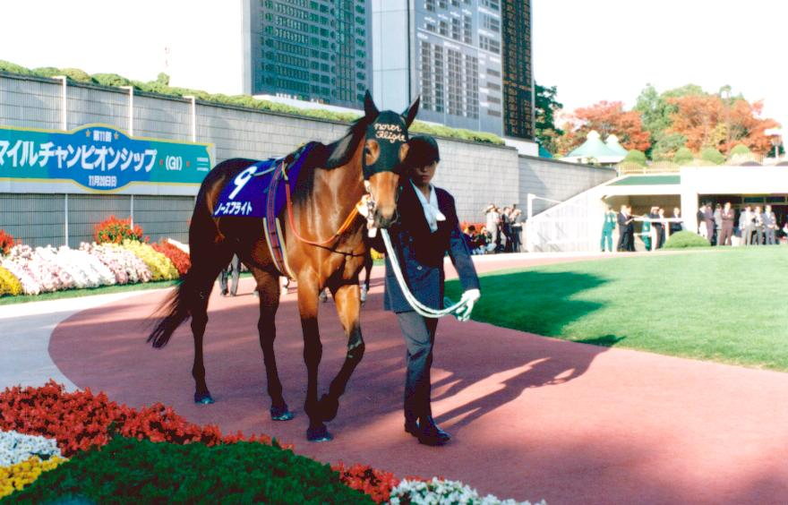 ノースフライト 1994マイルＣＳ